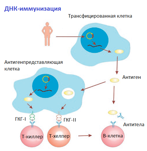 Схема иммунного ответа